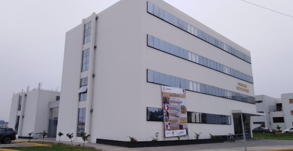 UNMSM Facultad de Ciencias Económicas Nuevo Pabellón 2019 - Vista lateral